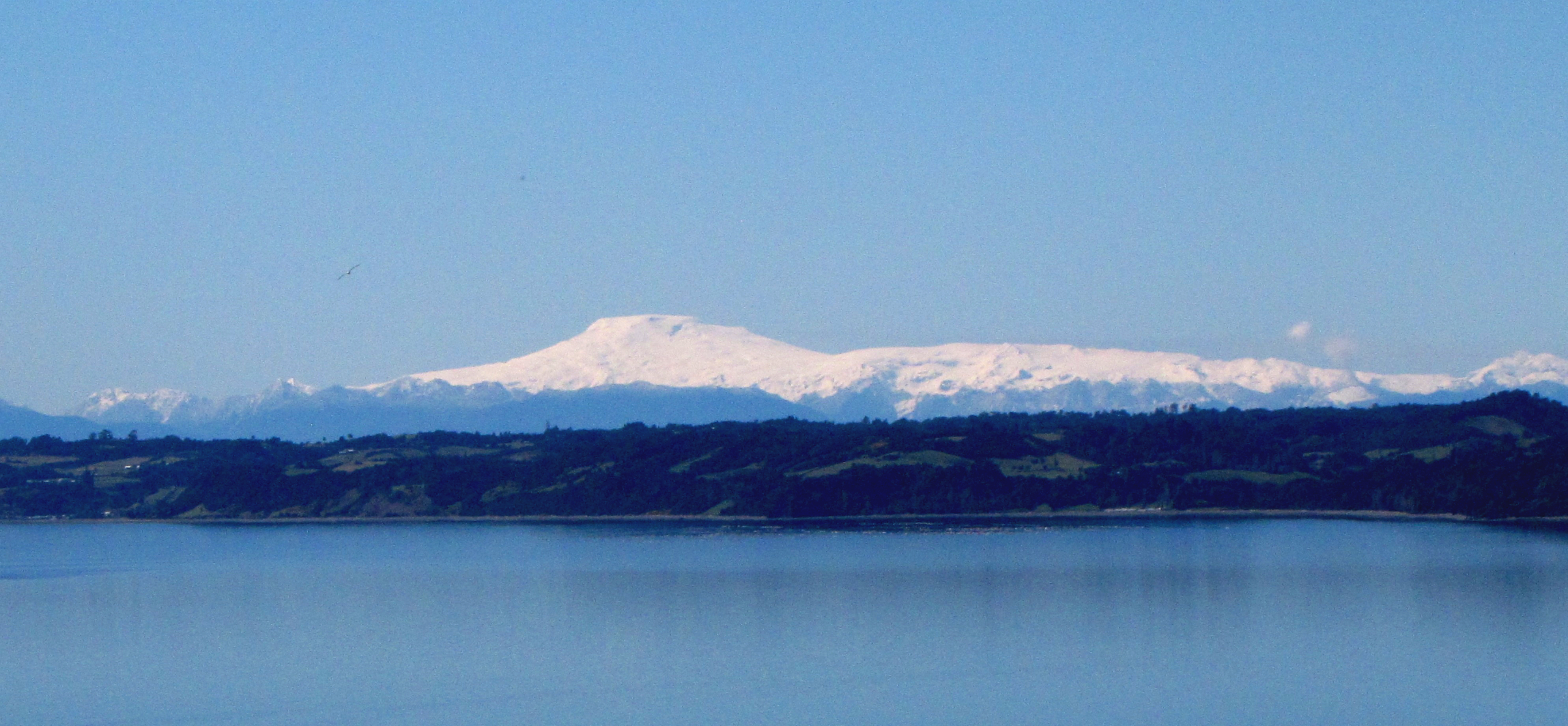 El volcán Michimáhuida y la isla de Lemuy vistos desde Quinched, Chonchi, Chile.